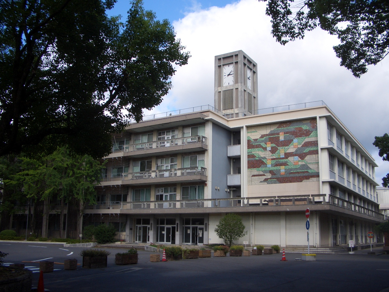 長崎大学文教キャンパス 全学教育・環境科学部棟